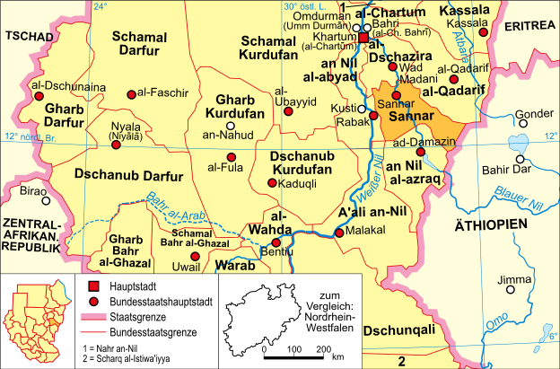 politische Karte des Sudan (Bundesstaat Sannar)